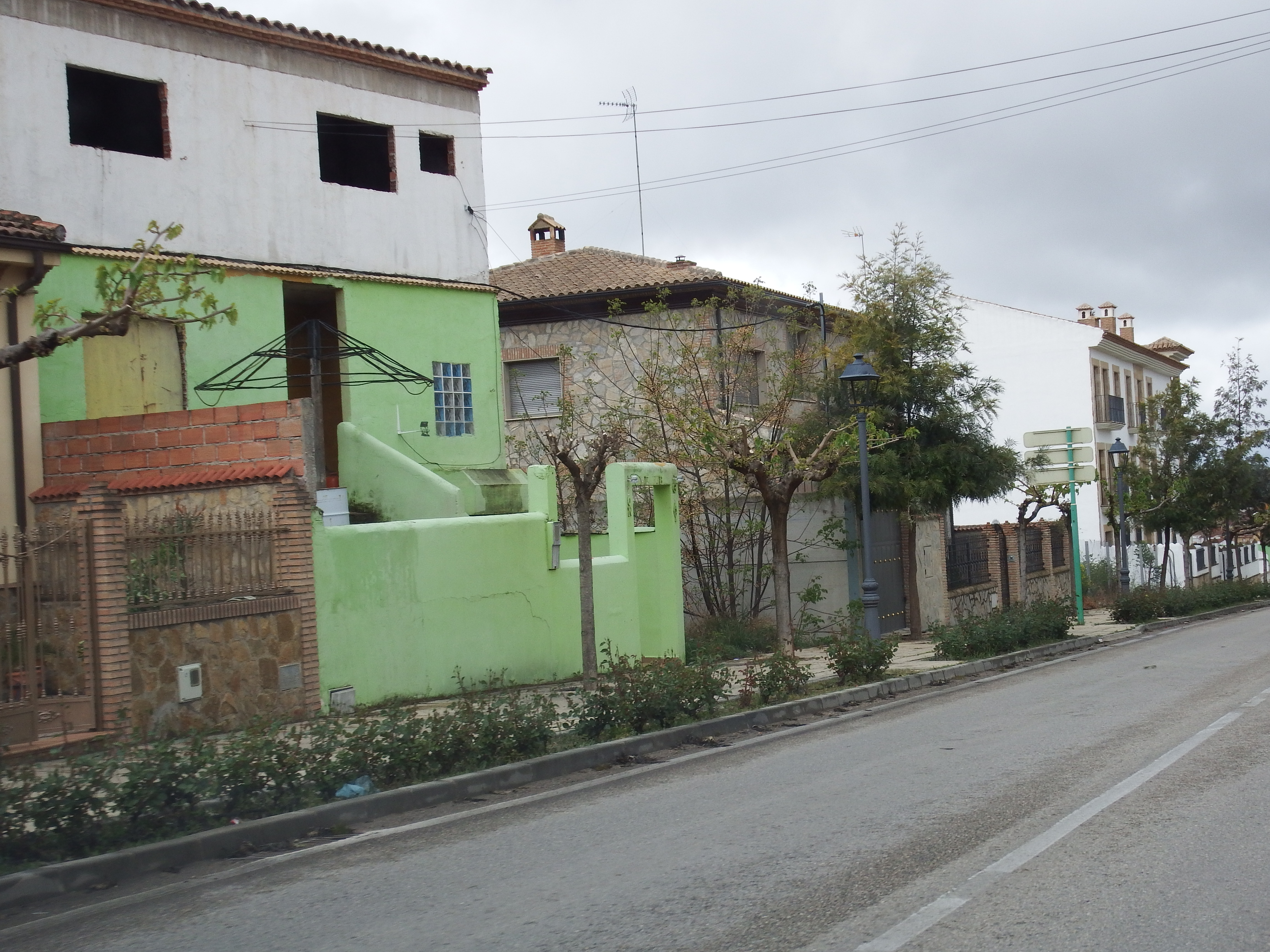 Ibros